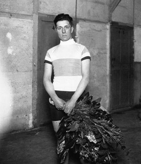 Léon Galvaing, vainqueur du match vitesse amateur du Vel'd'Hiv'